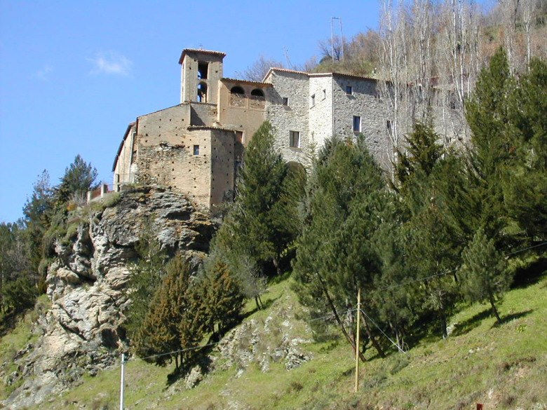 Pedace